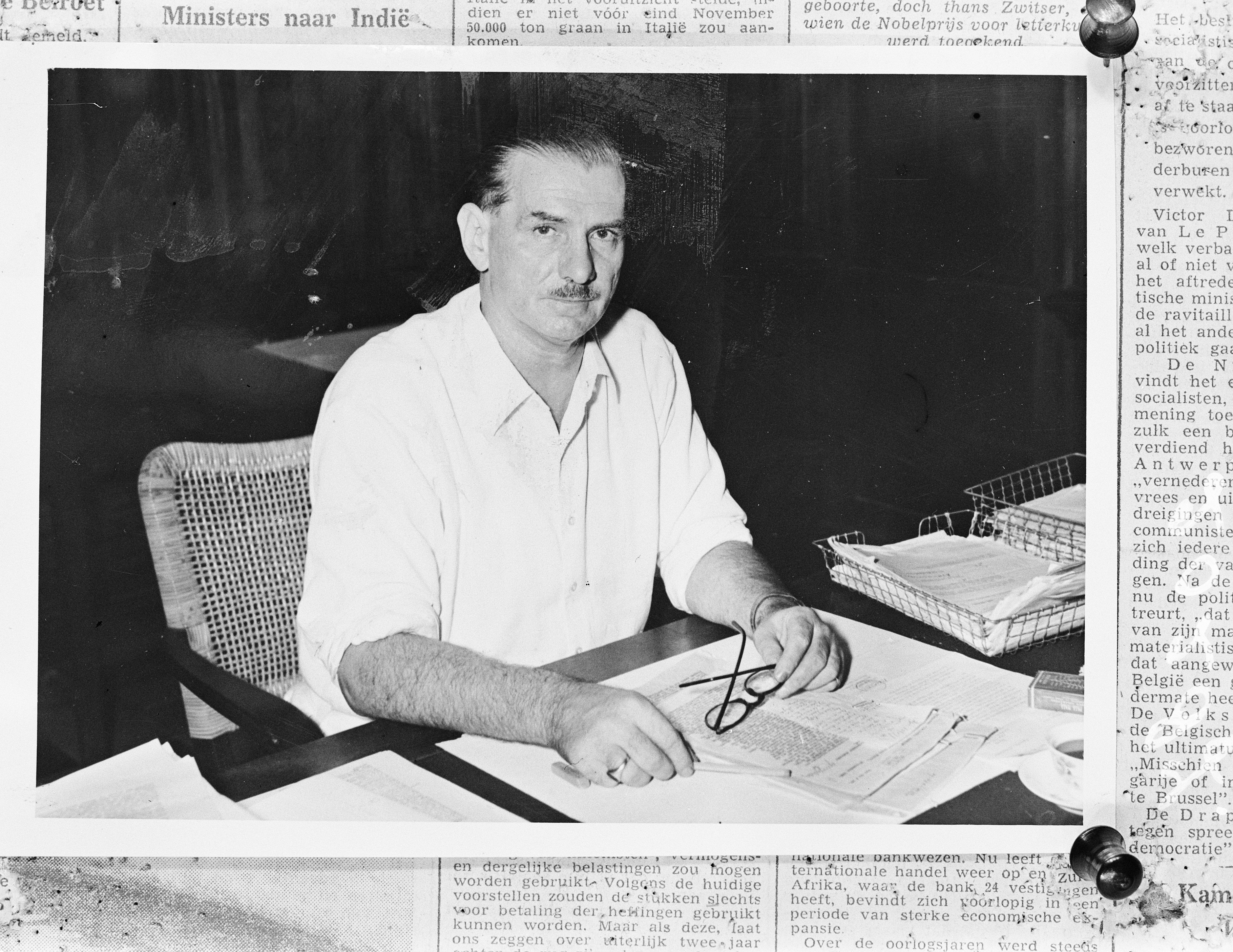 Collectie / Archief : Fotocollectie Anefo Reportage / Serie : [ onbekend ] Beschrijving : Dr. P. J. A. Idenburg. Directeur-generaal Algemene Zaken Datum : 5 februari 1947 Locatie : Indonesië, Nederlands-Indië Trefwoorden : ambtenaren Fotograaf : NIGIS [Netherlands Indies Government Information Service] Auteursrechthebbende : Nationaal Archief Materiaalsoort : Glasnegatief Nummer archiefinventaris : bekijk toegang 2.24.01.09 Bestanddeelnummer : 902-0286